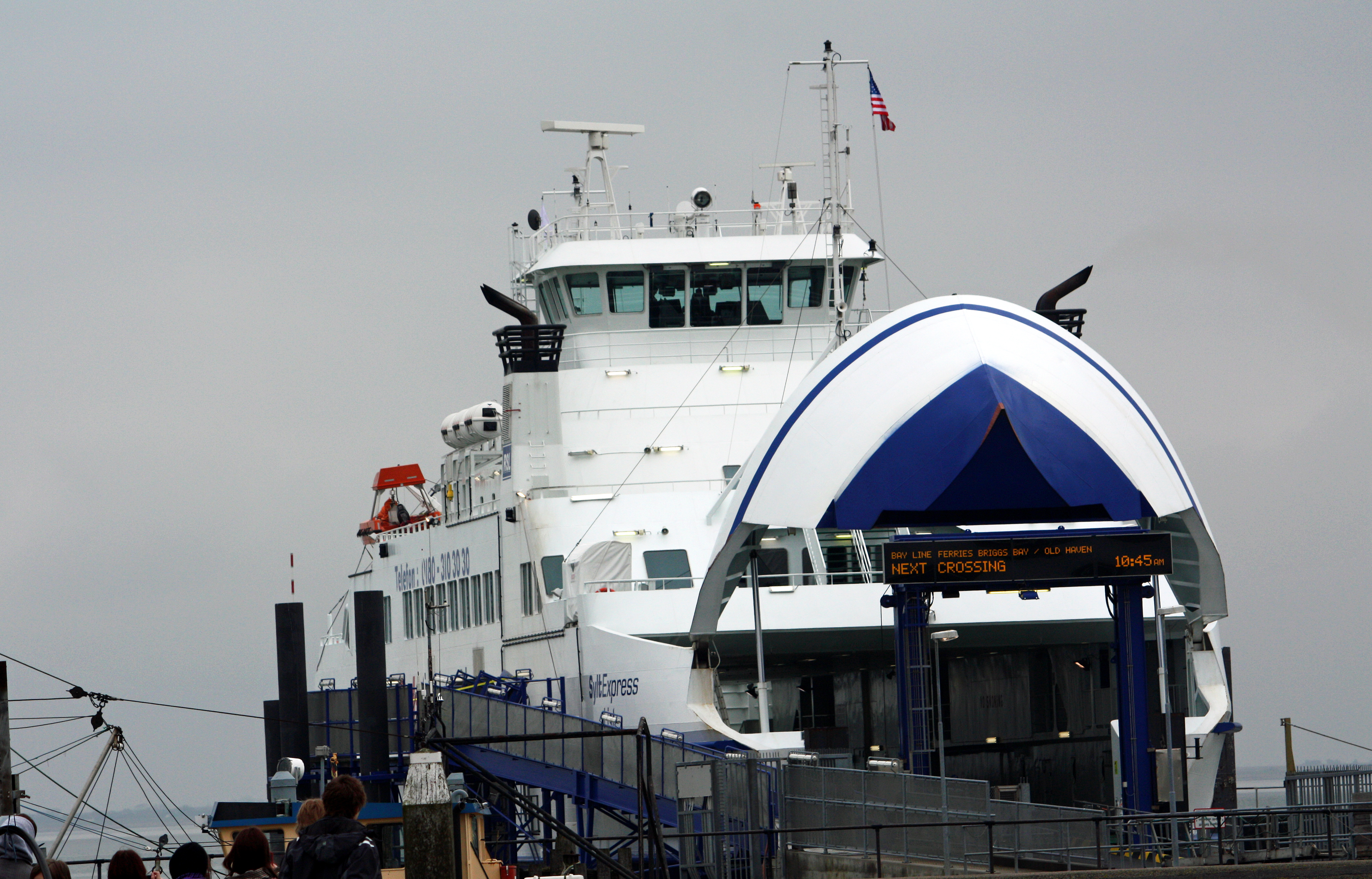 SETPHOTO: In Roman Polanskis "The Ghostwriter" wurde die Fähre der Römö-Sylt-Linie in die US-Amerikanische "Bay Line Ferry" umfunktioniert. Die eigentlich Deutsch-Dänische Fähre wurde für 3 Tage gemietet und amerikanisiert. So wurden Zufahrtdisplays in englischer Sprache ausgegeben und die Fähre selber mit einer US-Flagge ausstaffiert.